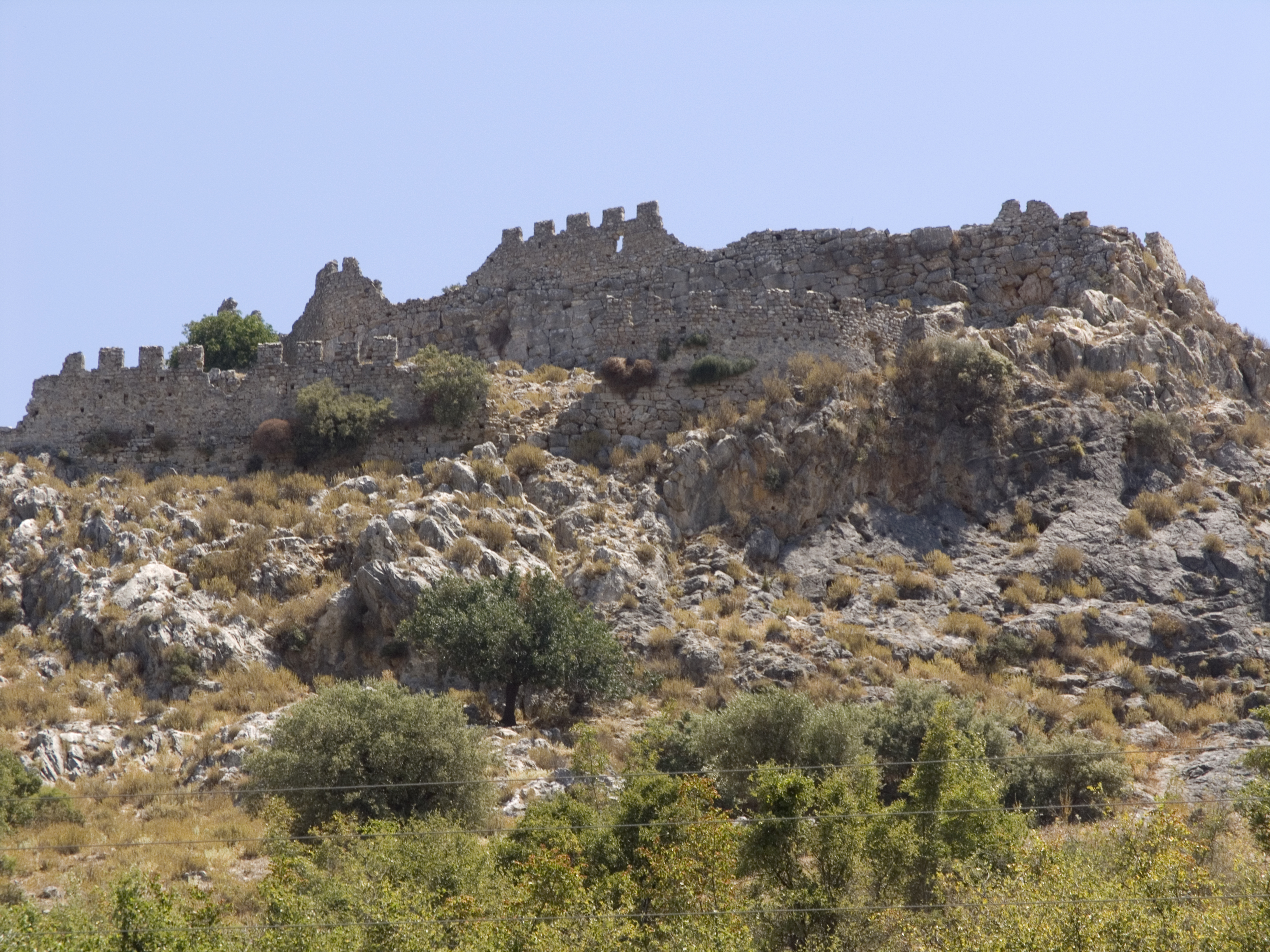 Турция, Дальян – античный город Кавн